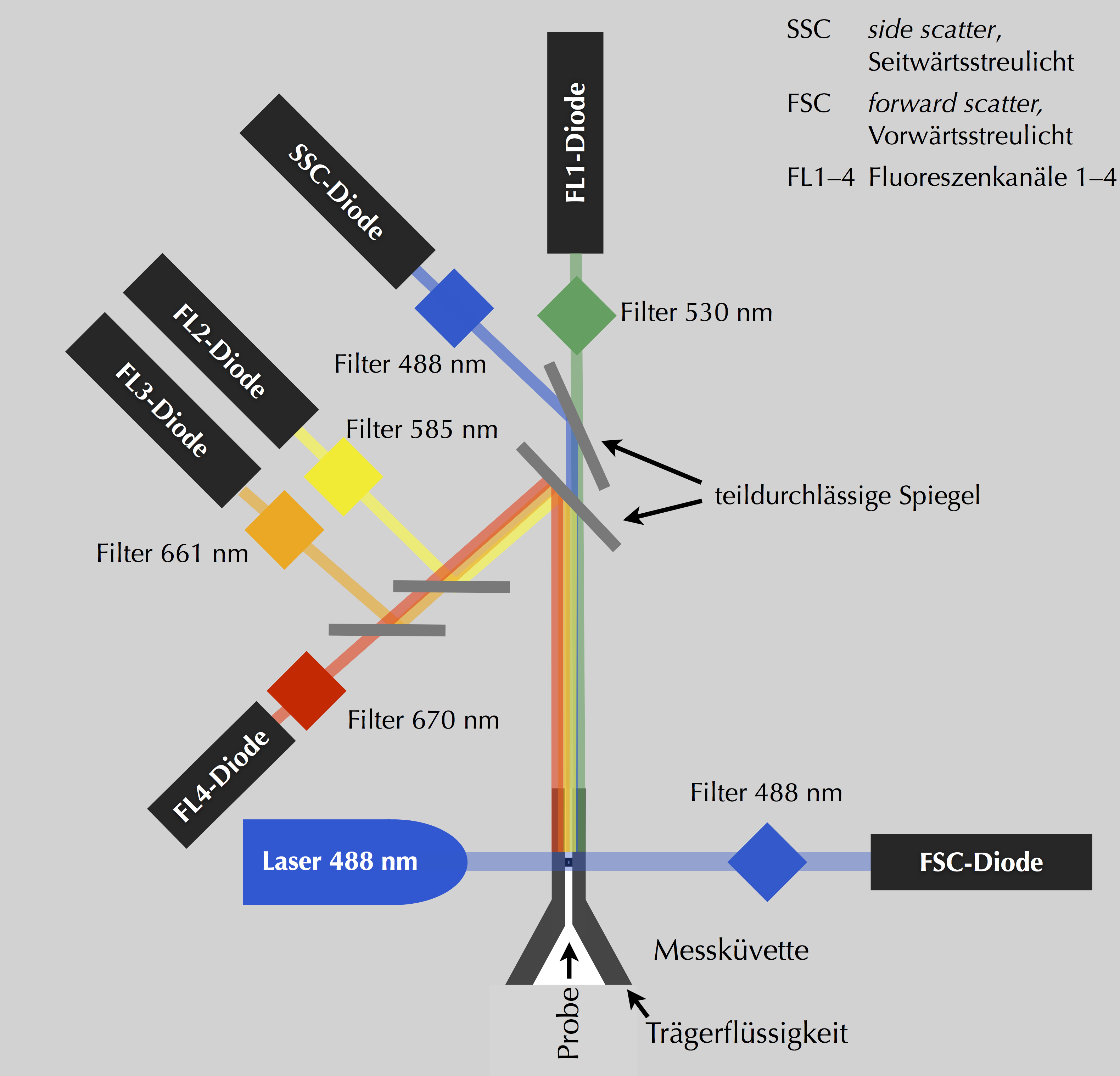 Schematischer Aufbau eines Durchflusszytometers, hier mit einem Laser mit einer Wellenlänge von 488 nm und vier Fluoreszenzkanälen